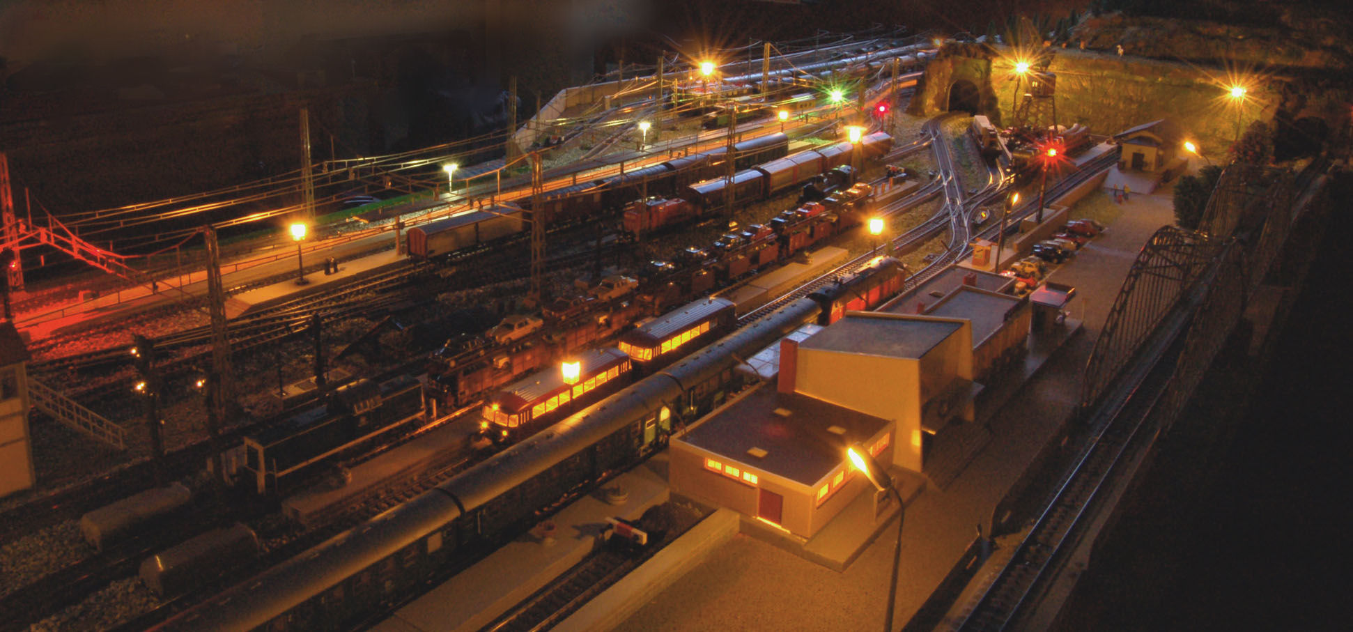 Plastico Maerklin in notturna